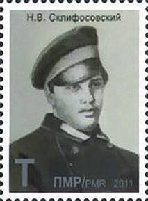 Nikolai Vasilyevich Sklifosovsky